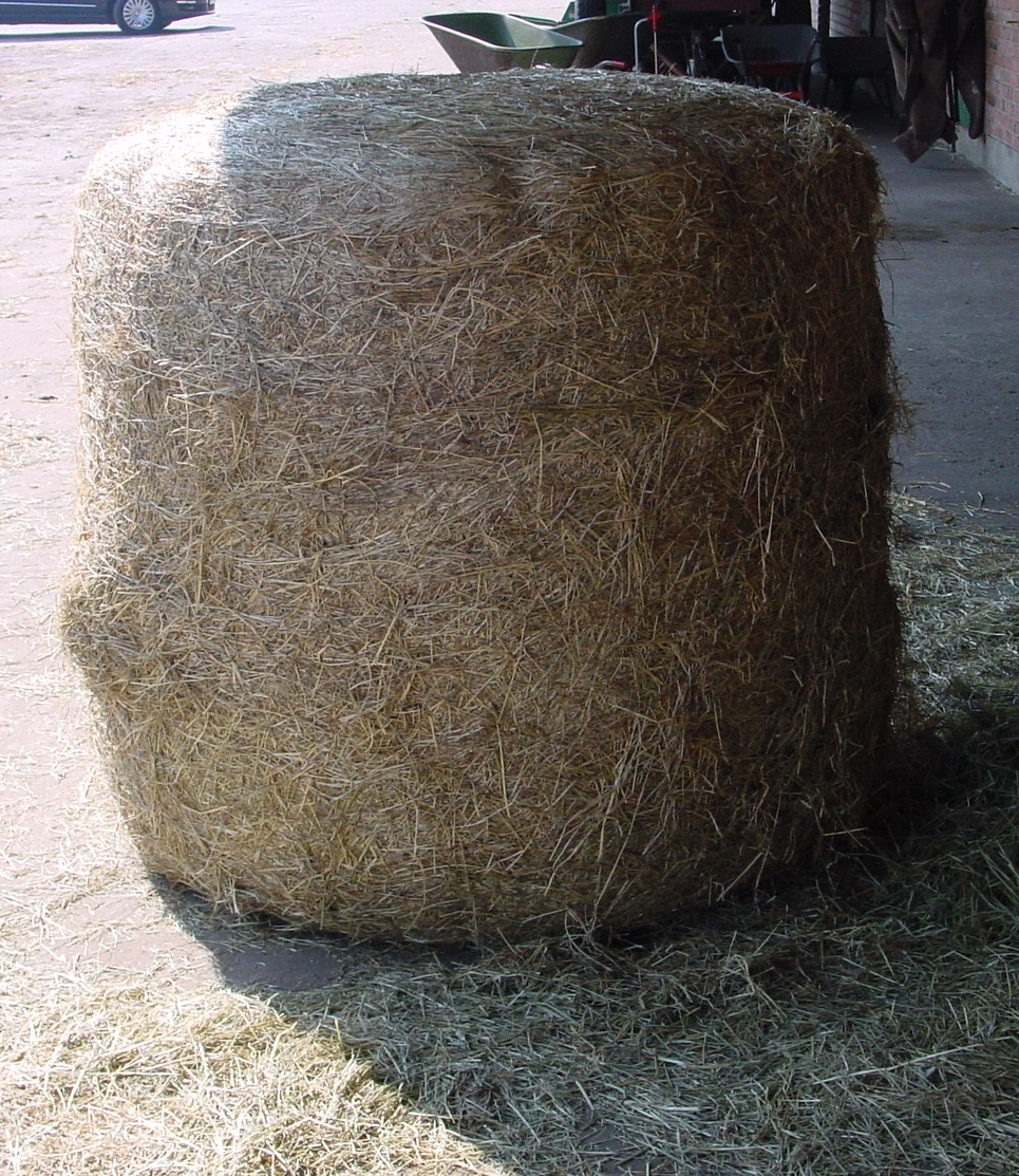 Heulageballen